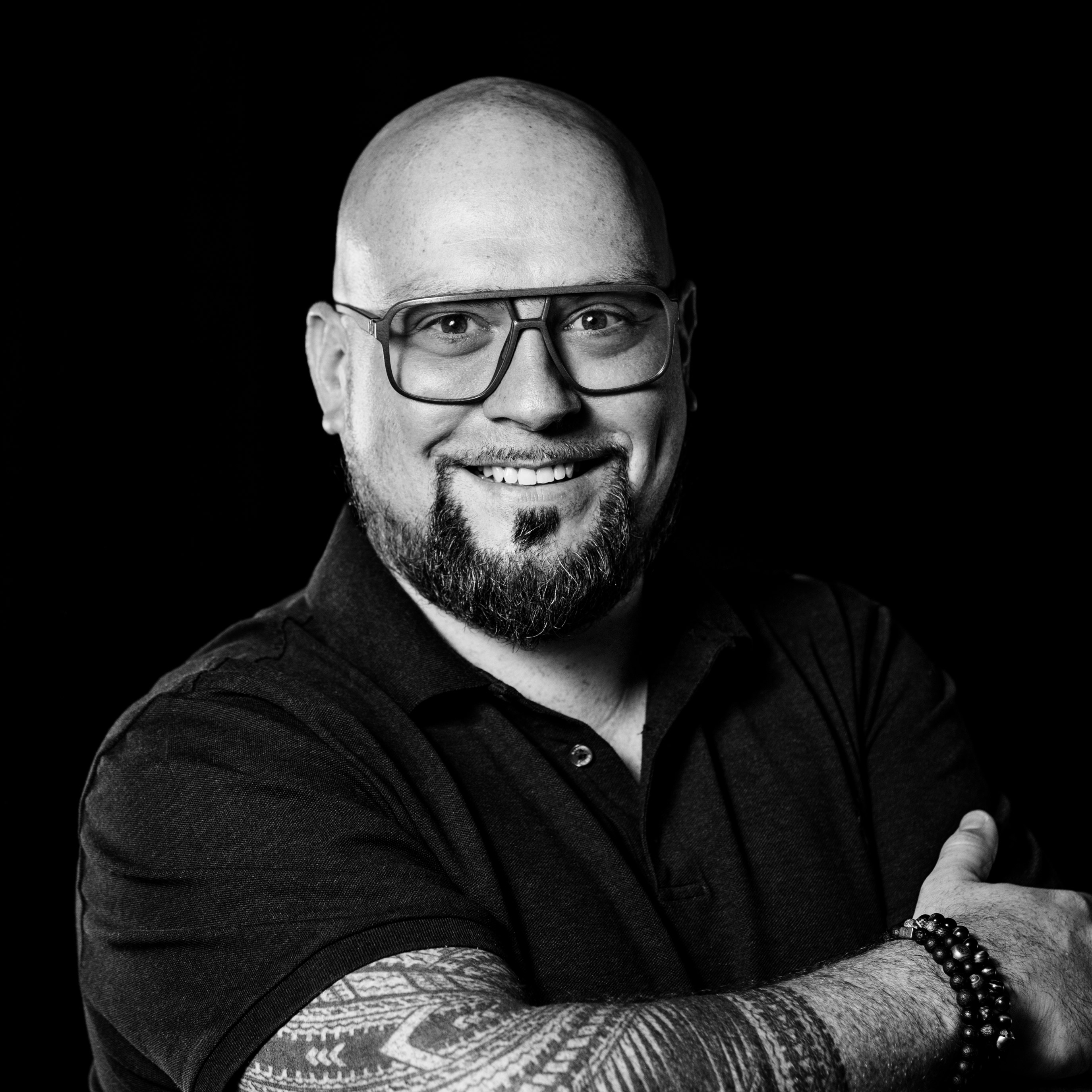 Autorenfoto von Benjamin Schulz